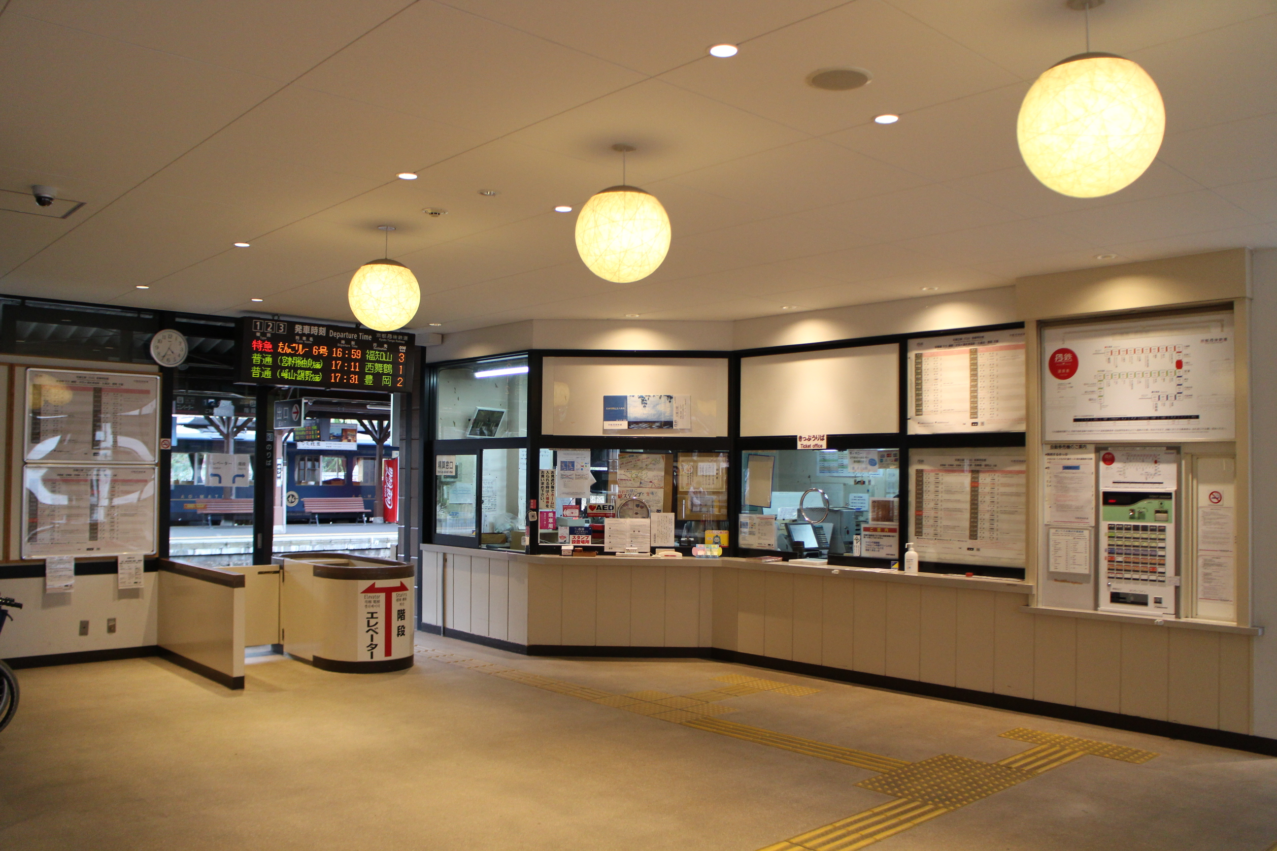 京都丹後鉄道・天橋立駅